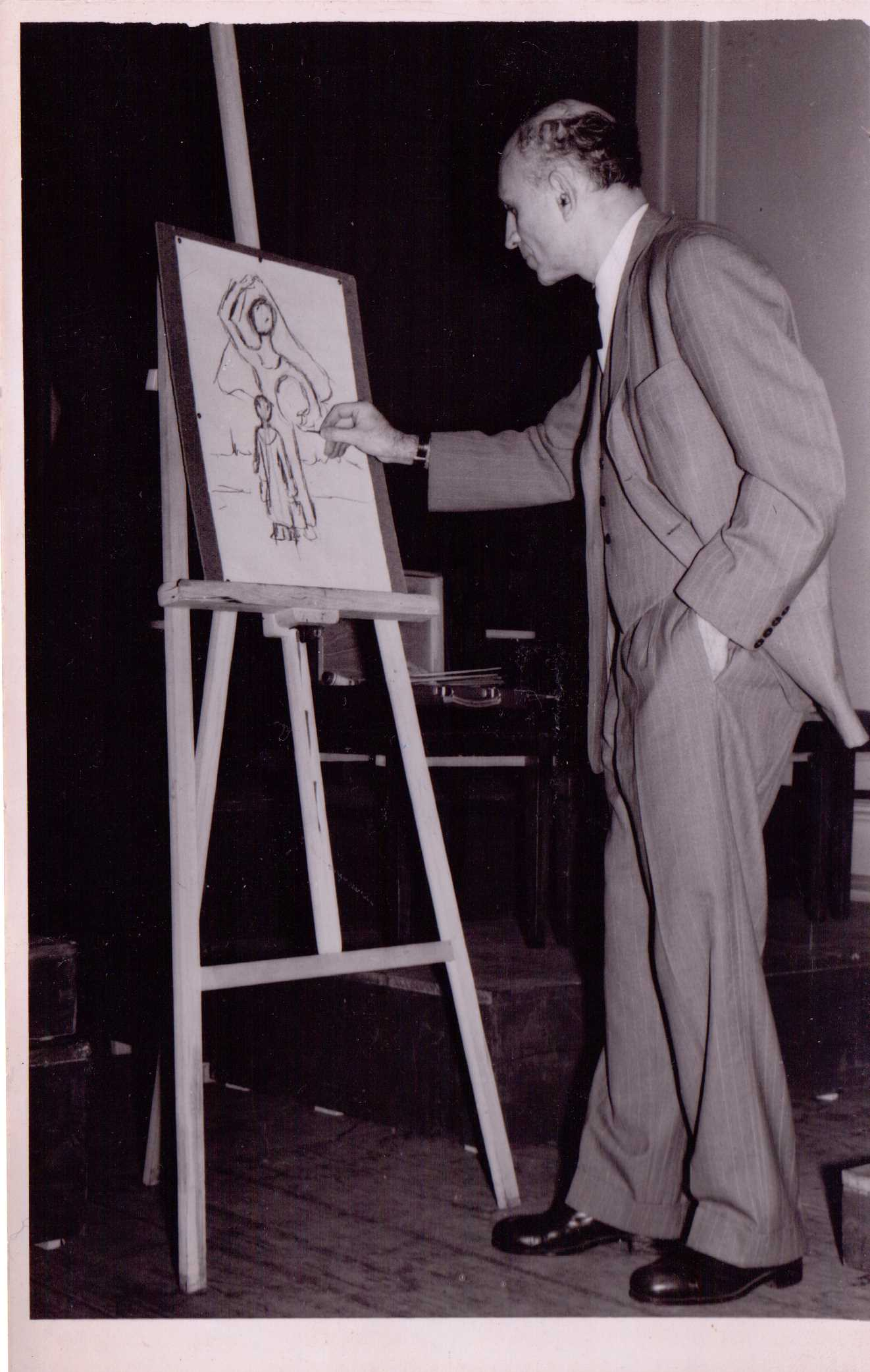 Raúl Schurjin brinda una demostración de pintura en vivo, durante su gira por Europa, en el vapor "La Argentina" (década de 1960)